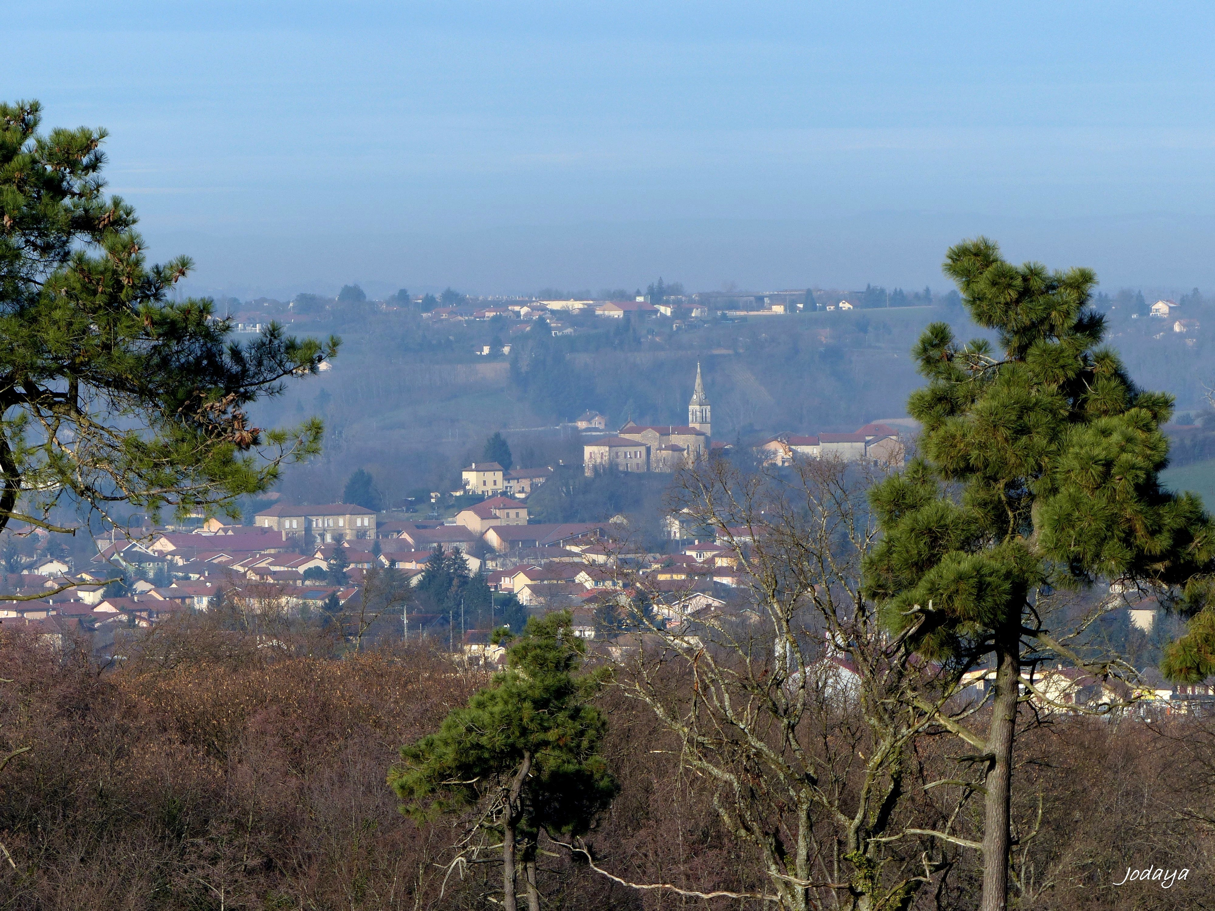 Charantonnay